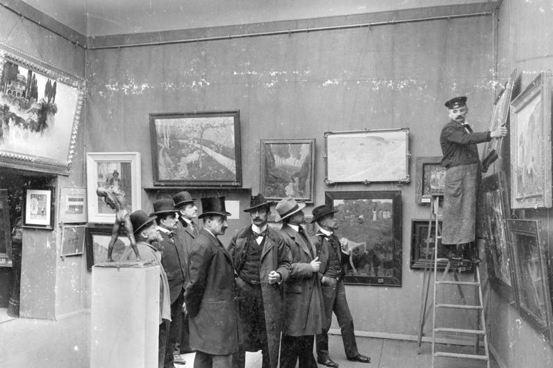 ADN-ZB/Archiv Berlin 1904: Die Ausstellungsvorbereitung der Berliner Sezession. Vorstand und Hängekommision bei der Arbeit. v.l.n.r. Willy Döring, Bruno Cassirer, Otto Engel, Max Liebermann, Walter Leistikow, Kurt Herrmann, Fritz Klimsch. (Aufn. 1904)